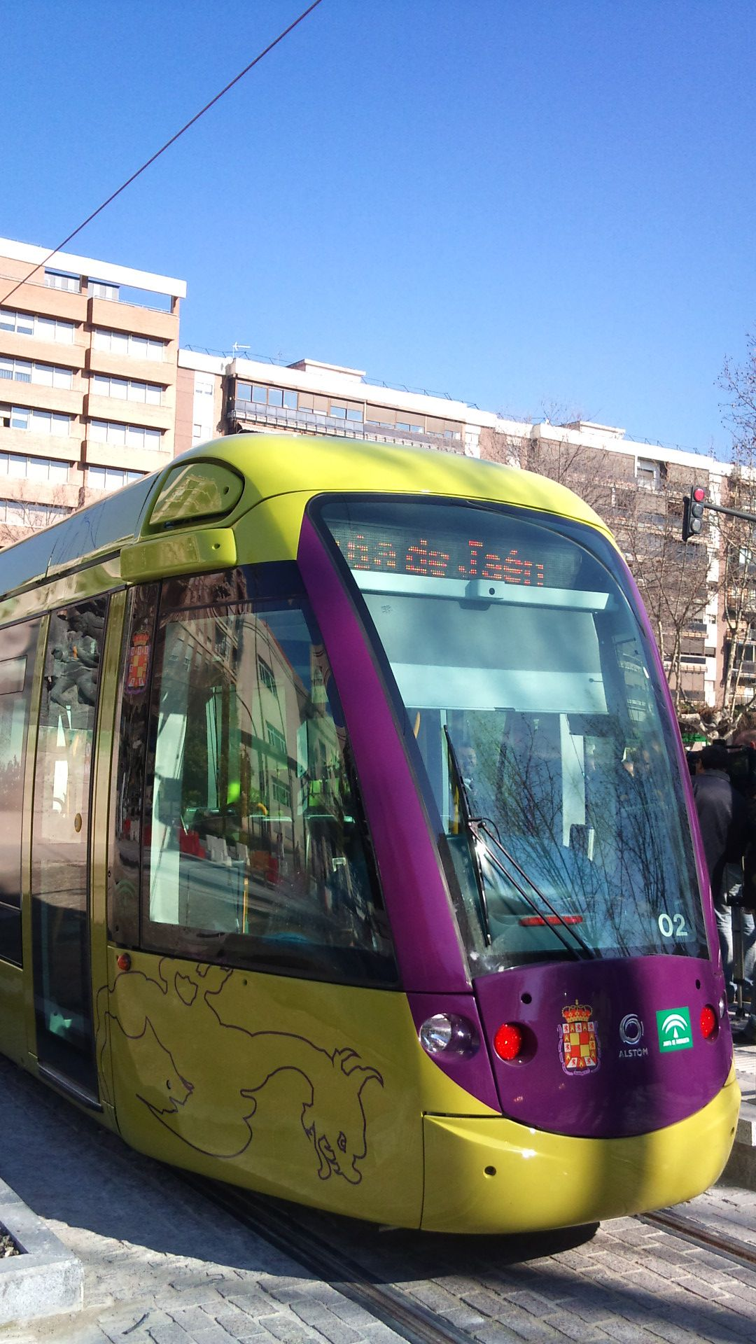 Vista del frontal del tranvía de Jaén en la parada de Las Batallas durante su primera prueba.